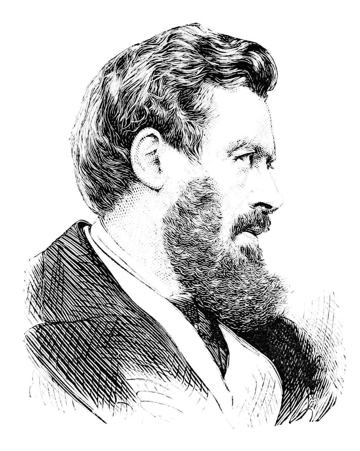 Walter Bagehot